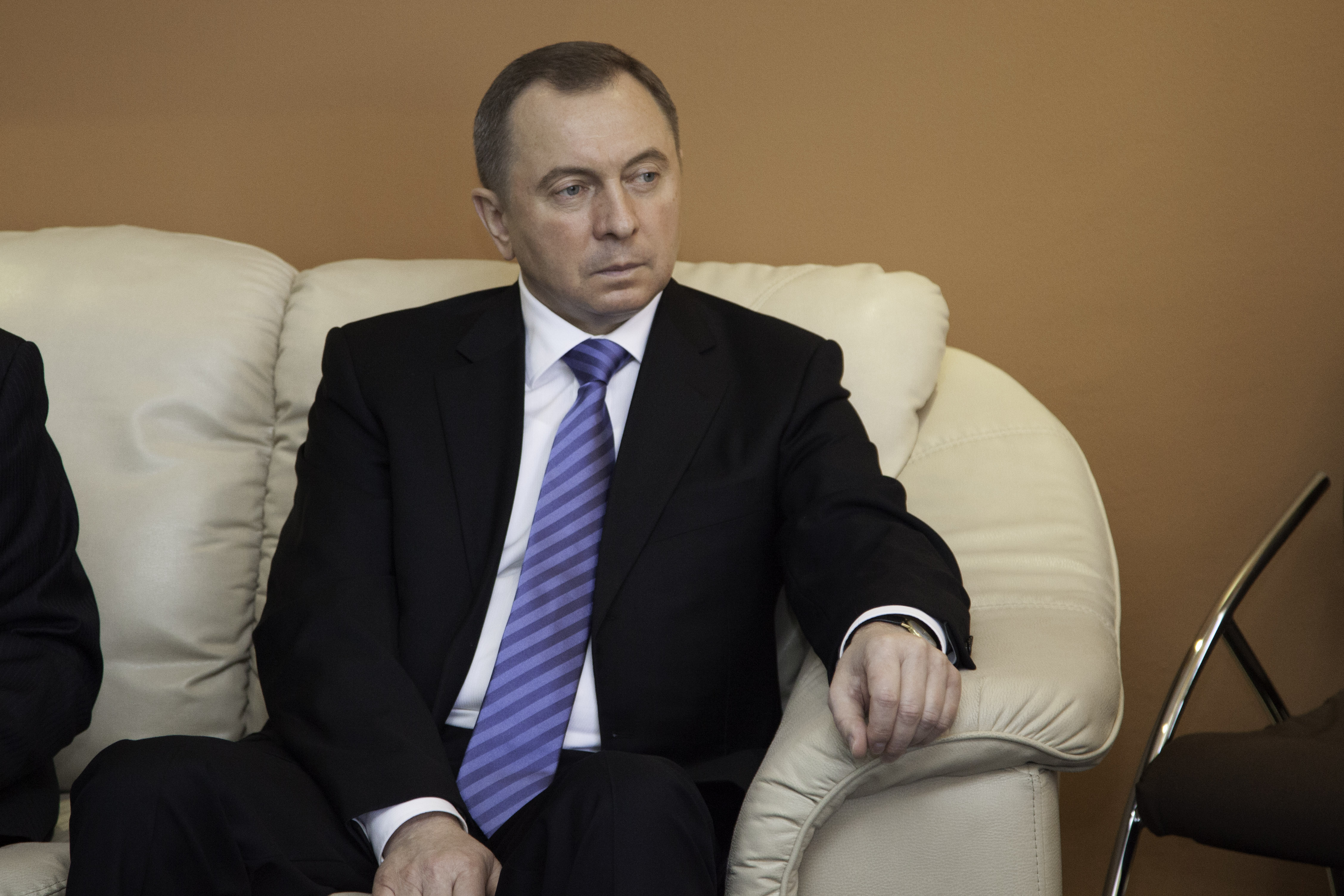 Quito (Ecuador) 20 de Junio del 2014. El Ministro de Relaciones Exteriores y Movilidad Humana, Ricardo Patiño, mantuvo una reunión con su homólogo de Belarús, Vladimir Makei. Foto: Nina Zambrano Díaz. Cancillería del Ecuador.